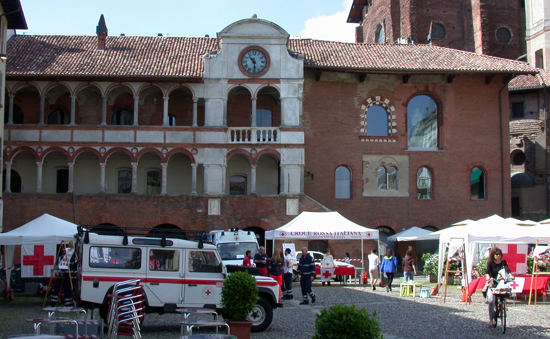 Il Broletto a Pavia